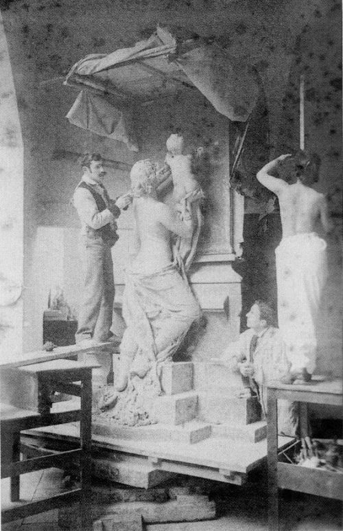 Realización de la obra